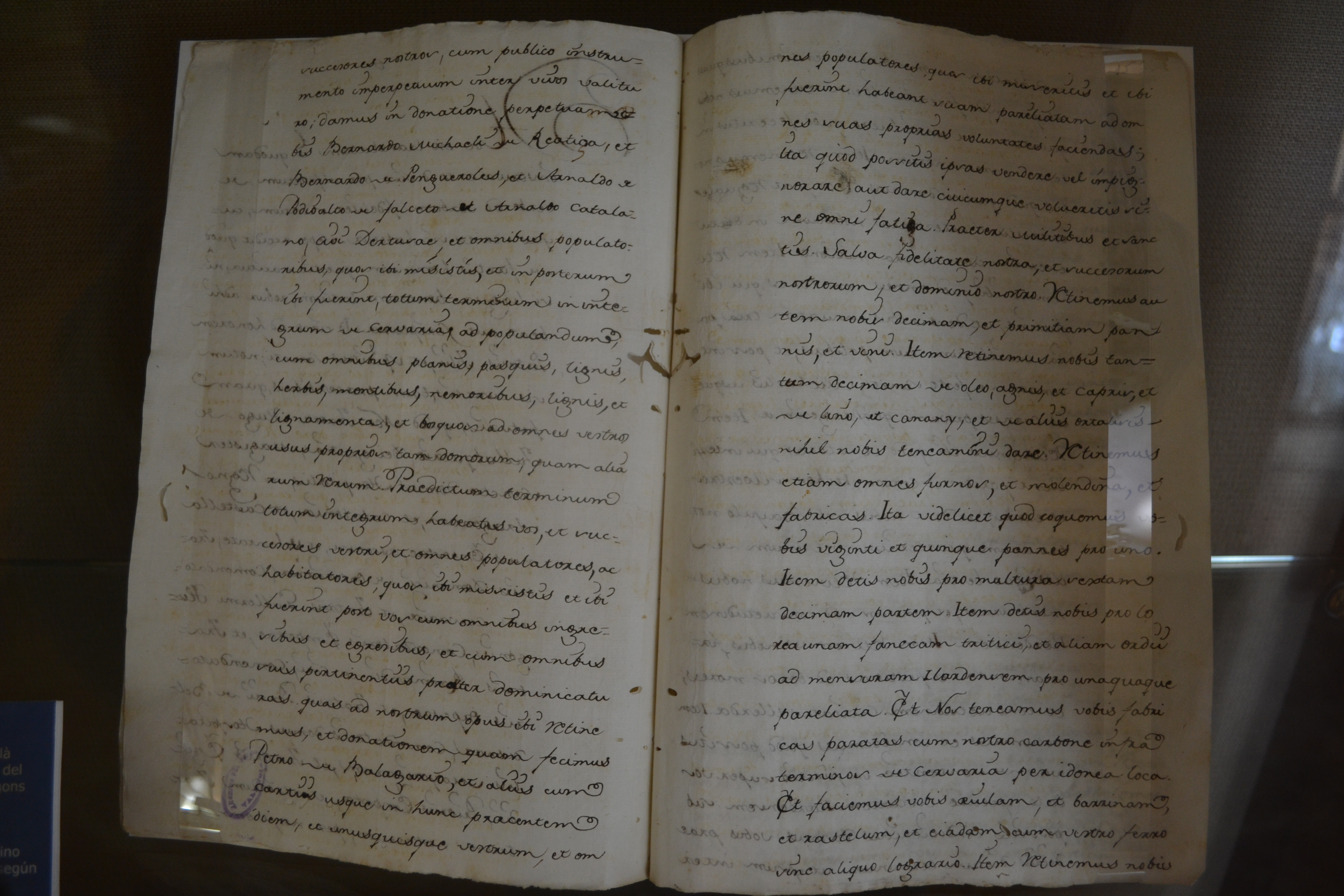 Fra Hug de Fullalquer, Mestre de l' Orde de l'Hospital i Castellà d'Amposta, concedeix carta pobla per a tot el terme general del castell de Cervera per a Bernat Miuel de Tevisa i altres, sgons el Csotum de Lleida (8 d'octubre de 1235). ARV: Clero, caixa 2330 (còpia de 24 de novembre de 1780). Arxiu del Regne de València.